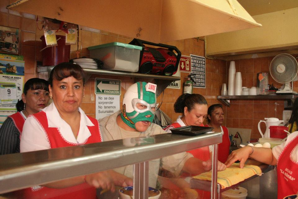 Perteneciente a la serie de fotografías detrás de las cámaras de la grabación del primer capítulo de la serie En Materia de Pescado